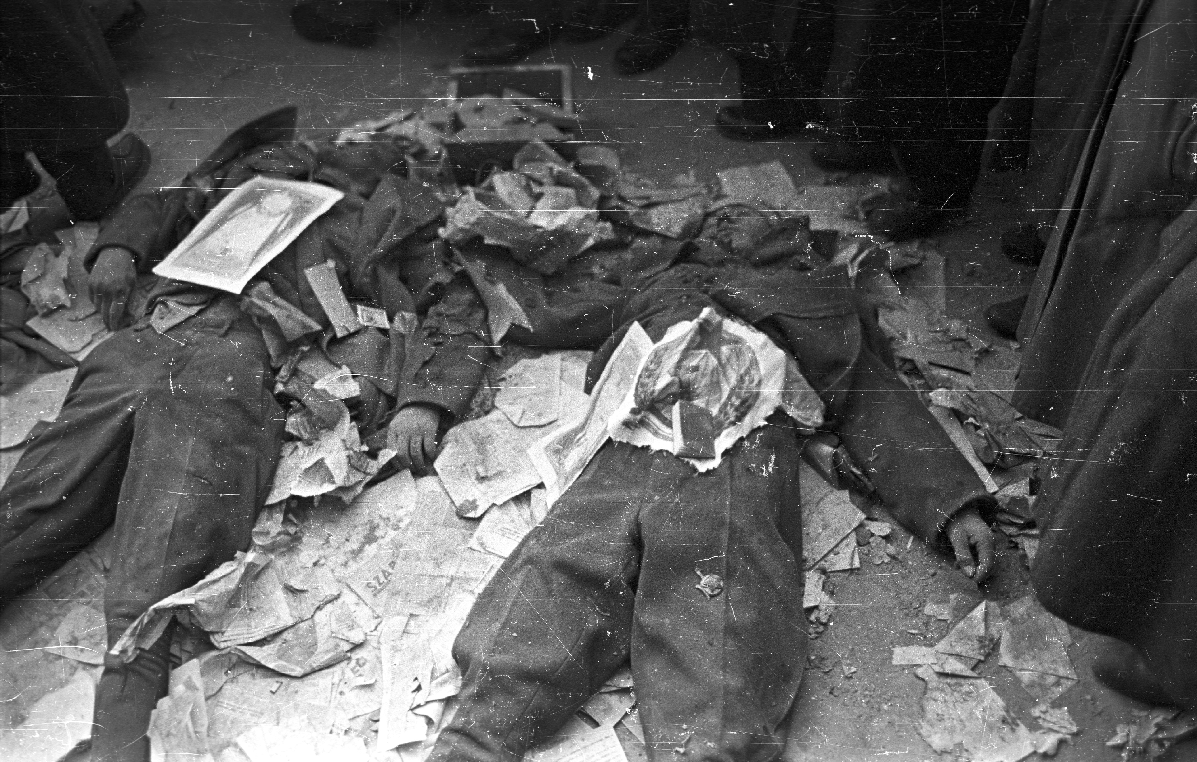 II. János Pál pápa (Köztársaság) tér, a pártház ostromakor kivégzett védők holtteste. Location: Hungary, Budapest VIII. Tags: crest, corpse, revolution, book, Budapest Title: II. János Pál pápa (Köztársaság) tér, a pártház ostromakor kivégzett védők holtteste.